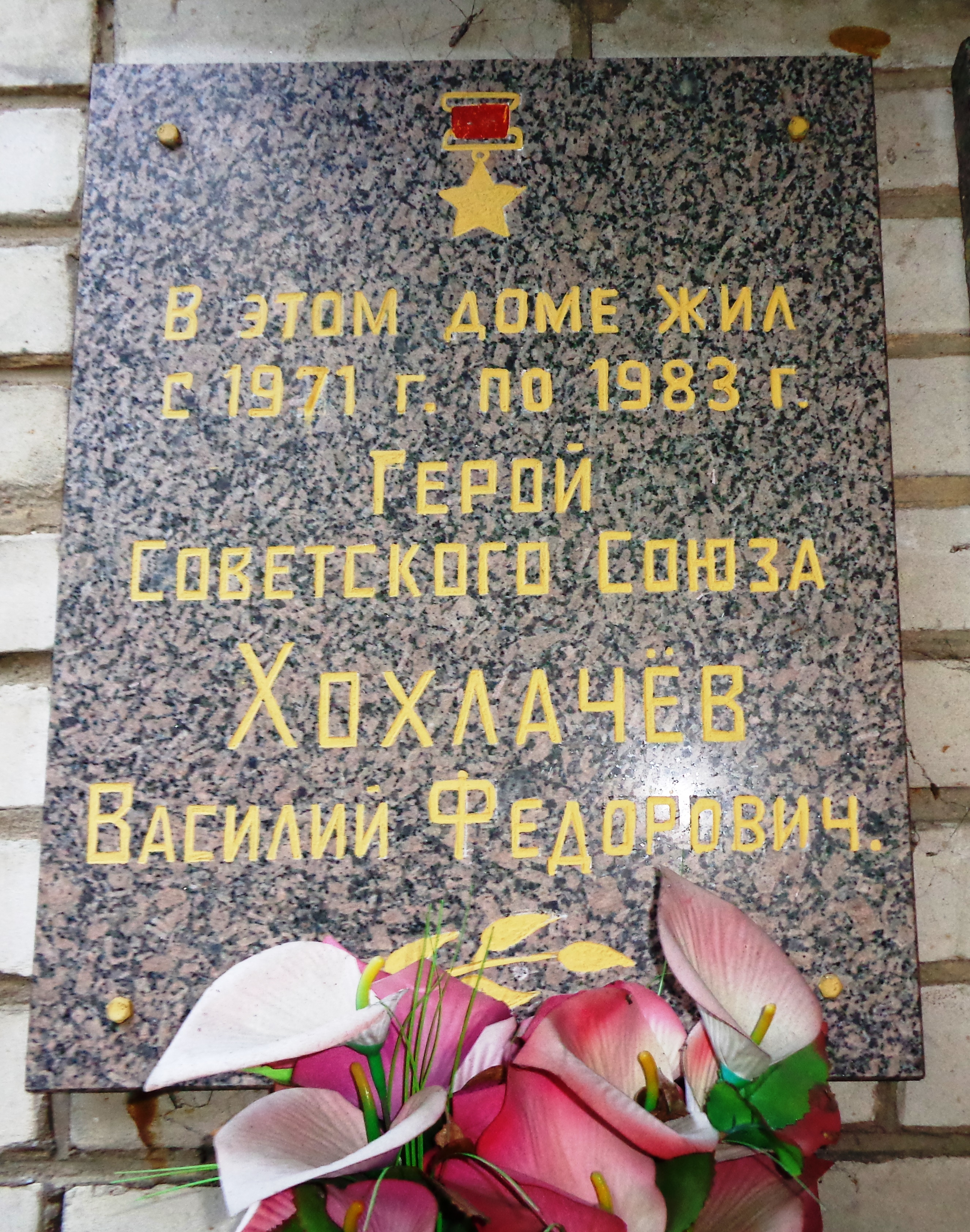 Мемориальная доска на доме в поселке Монино Московской области, где проживал Герой Советского Союза В.Ф. Хохлачёв